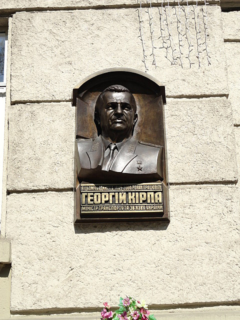 Мемориальная доска Георгию Кирпе, министру транспорта и связи Украины. Львов, управление железной дороги